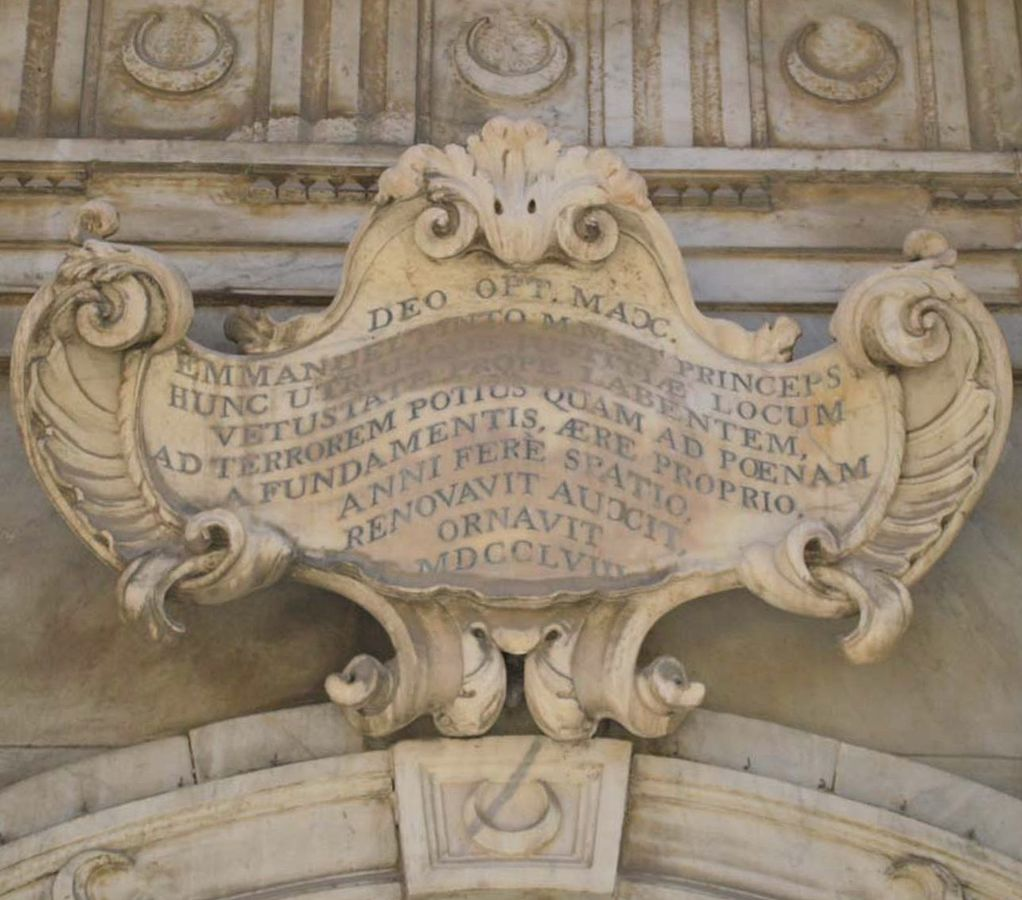 Inskrypcja upamiętniająca odbudowę Castellanii, Valletta, Malta